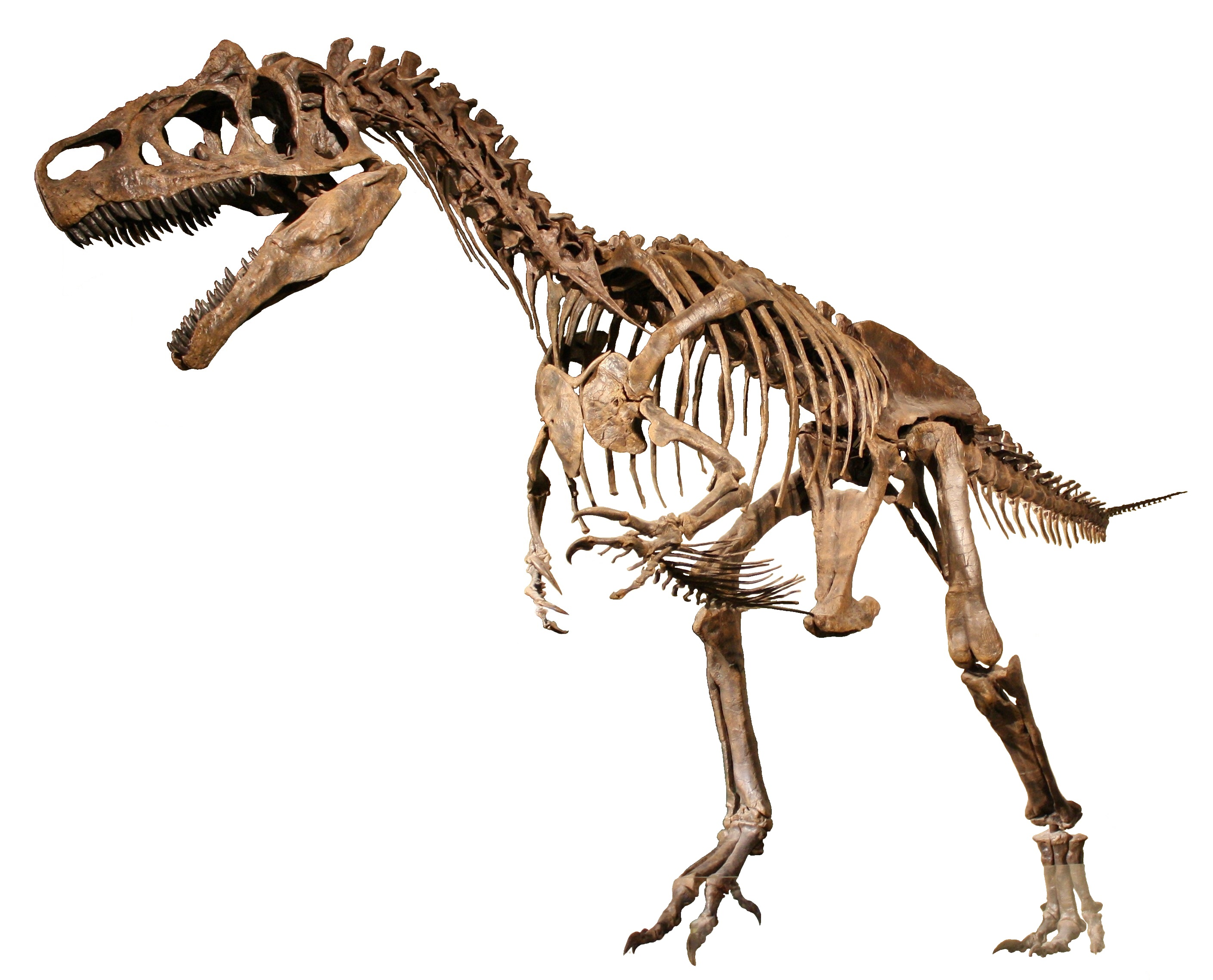 Allosaurus (Big Al II) (specimen SMA 0005)